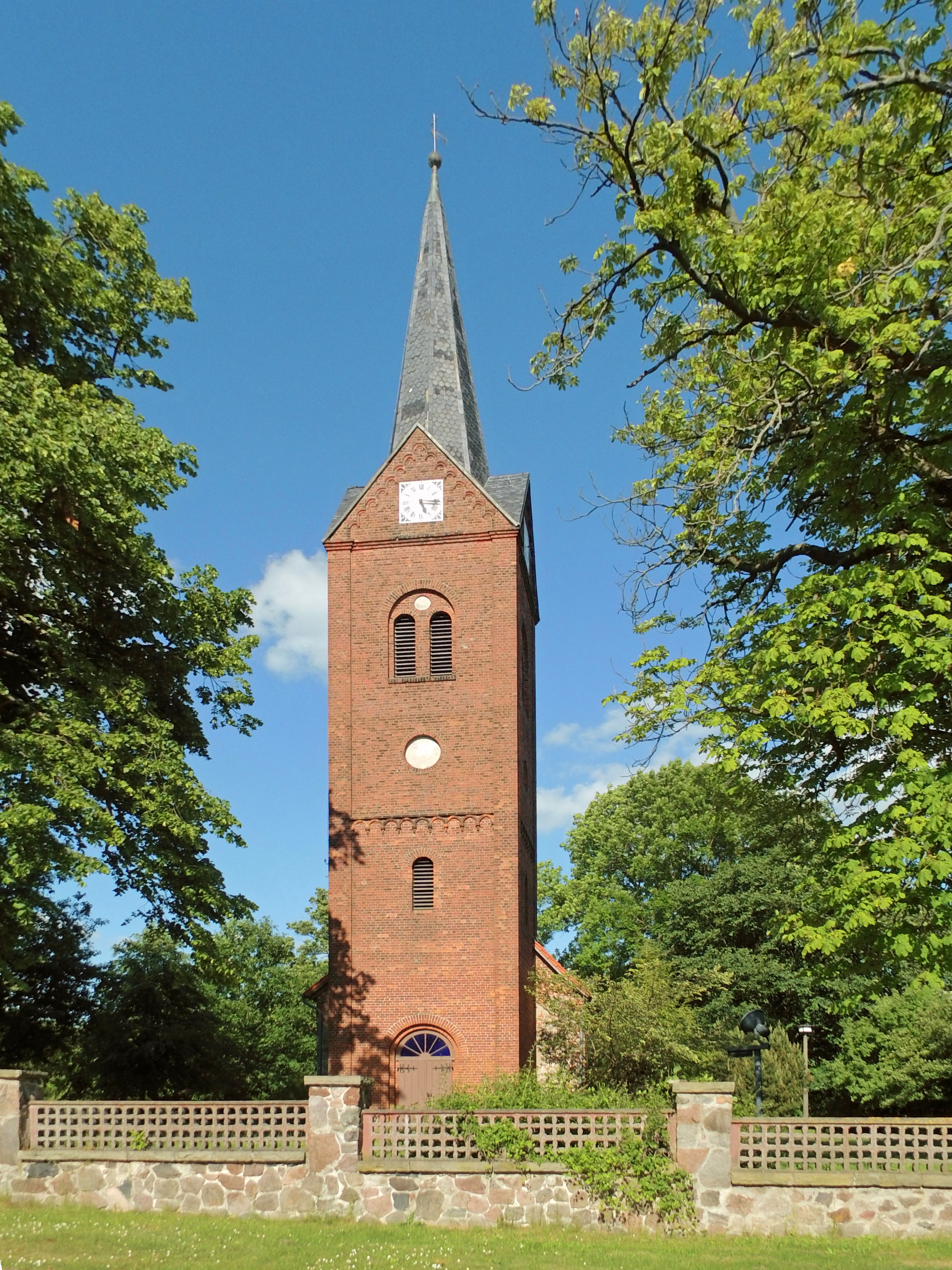 Evangelisch-lutherische Kirche in Jübar (Sachsen-Anhalt)